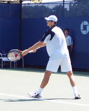 Self Made